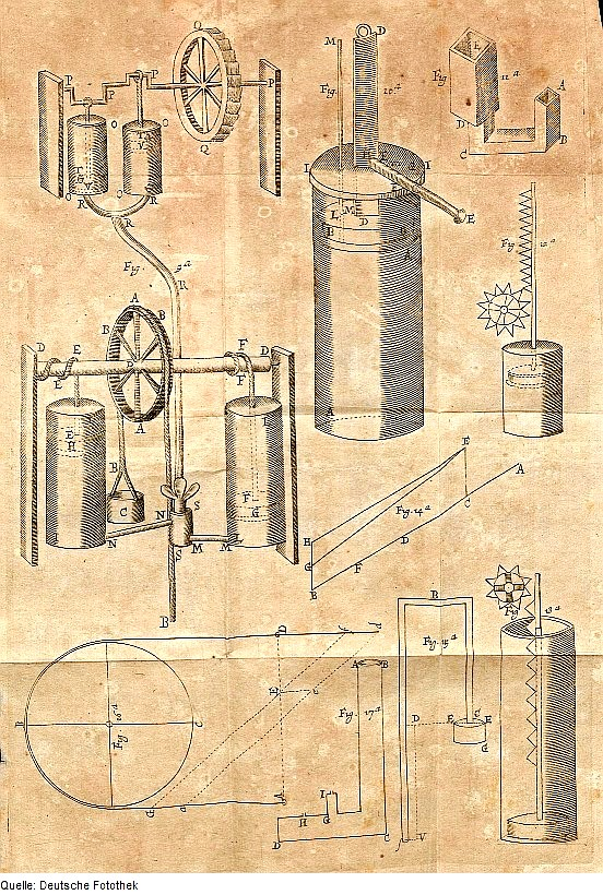 Original image description from the Deutsche FotothekPhysik & Thermodynamik & Druck & Dampf